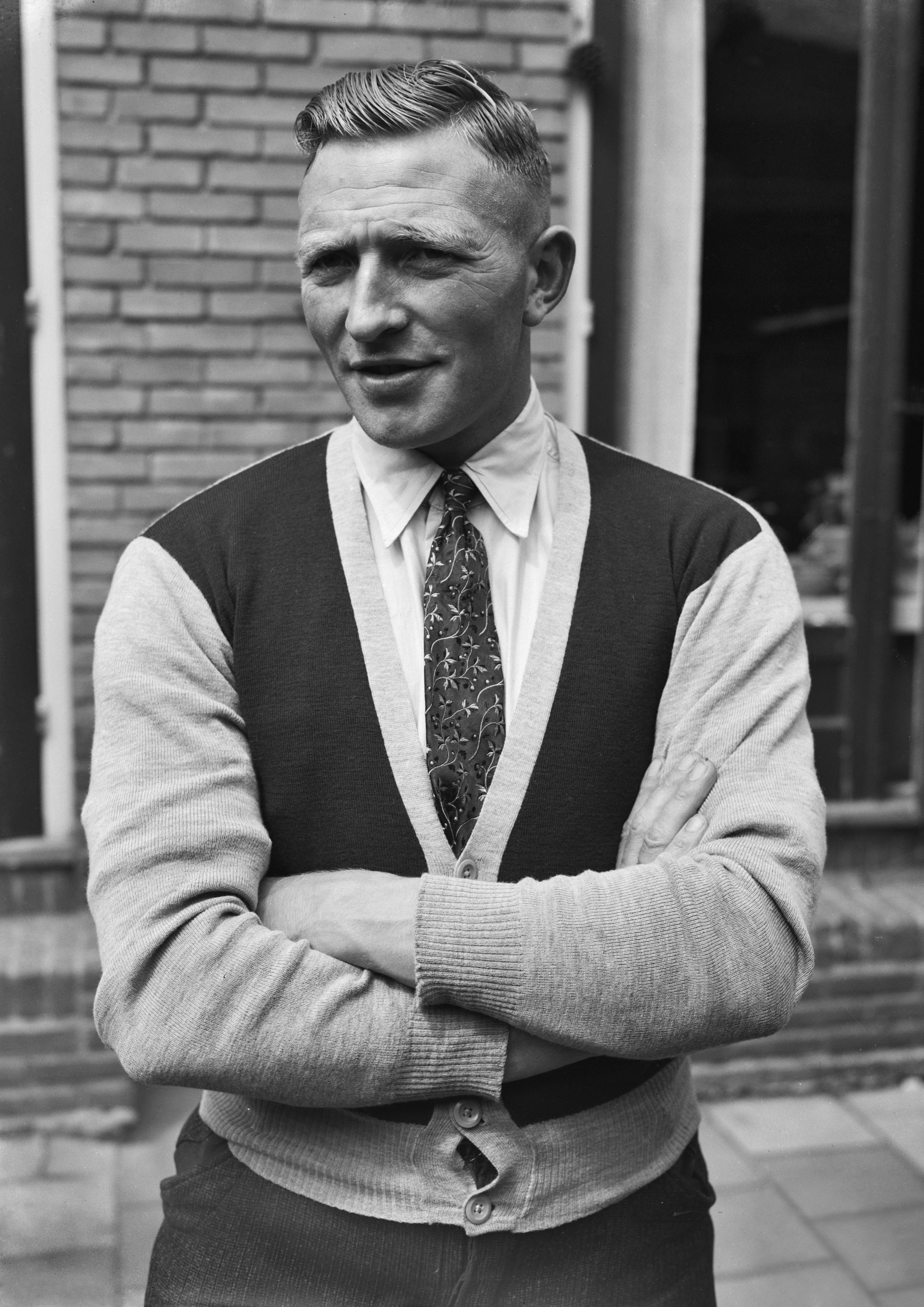 Collectie / Archief : Fotocollectie Anefo Reportage / Serie : [ onbekend ] Beschrijving : Kanoploeg van Helsinki. J. Bobeldijk Datum : 18 juni 1952 Persoonsnaam : J. Bobeldijk Fotograaf : Consenheim, Wim / Anefo Auteursrechthebbende : Nationaal Archief Materiaalsoort : Negatief (zwart/wit) Nummer archiefinventaris : bekijk toegang 2.24.01.04 Bestanddeelnummer : 905-1718